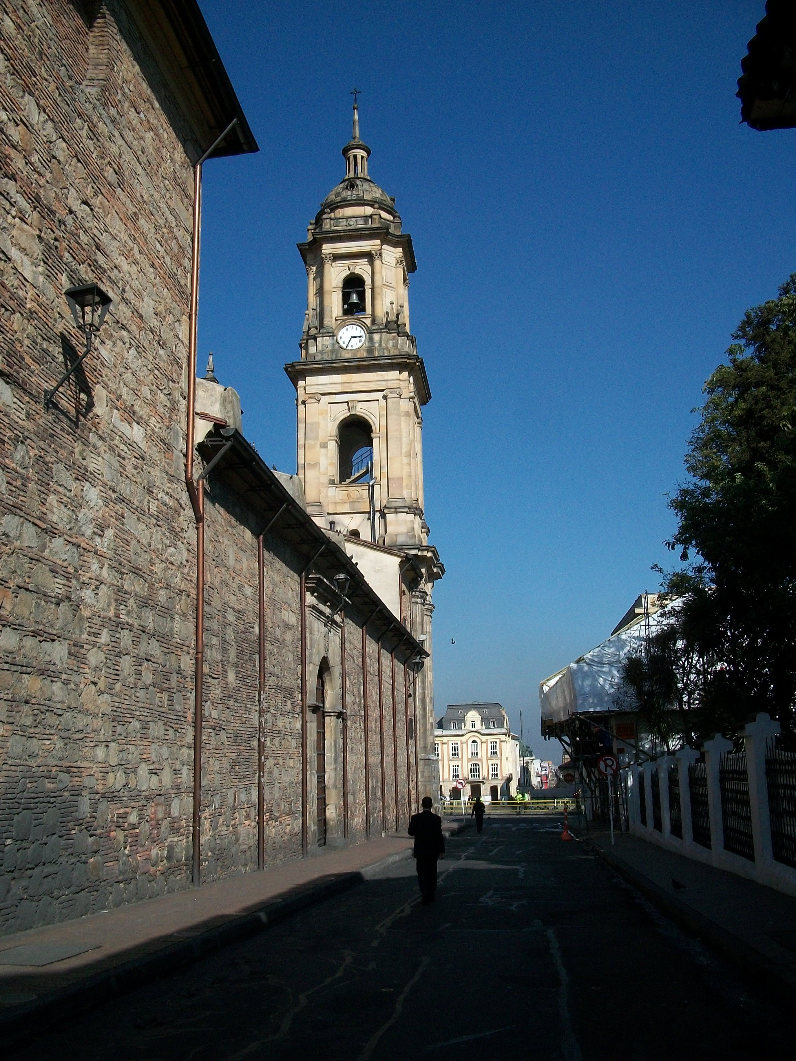 Côté nord de la Catédrale de Bogota.